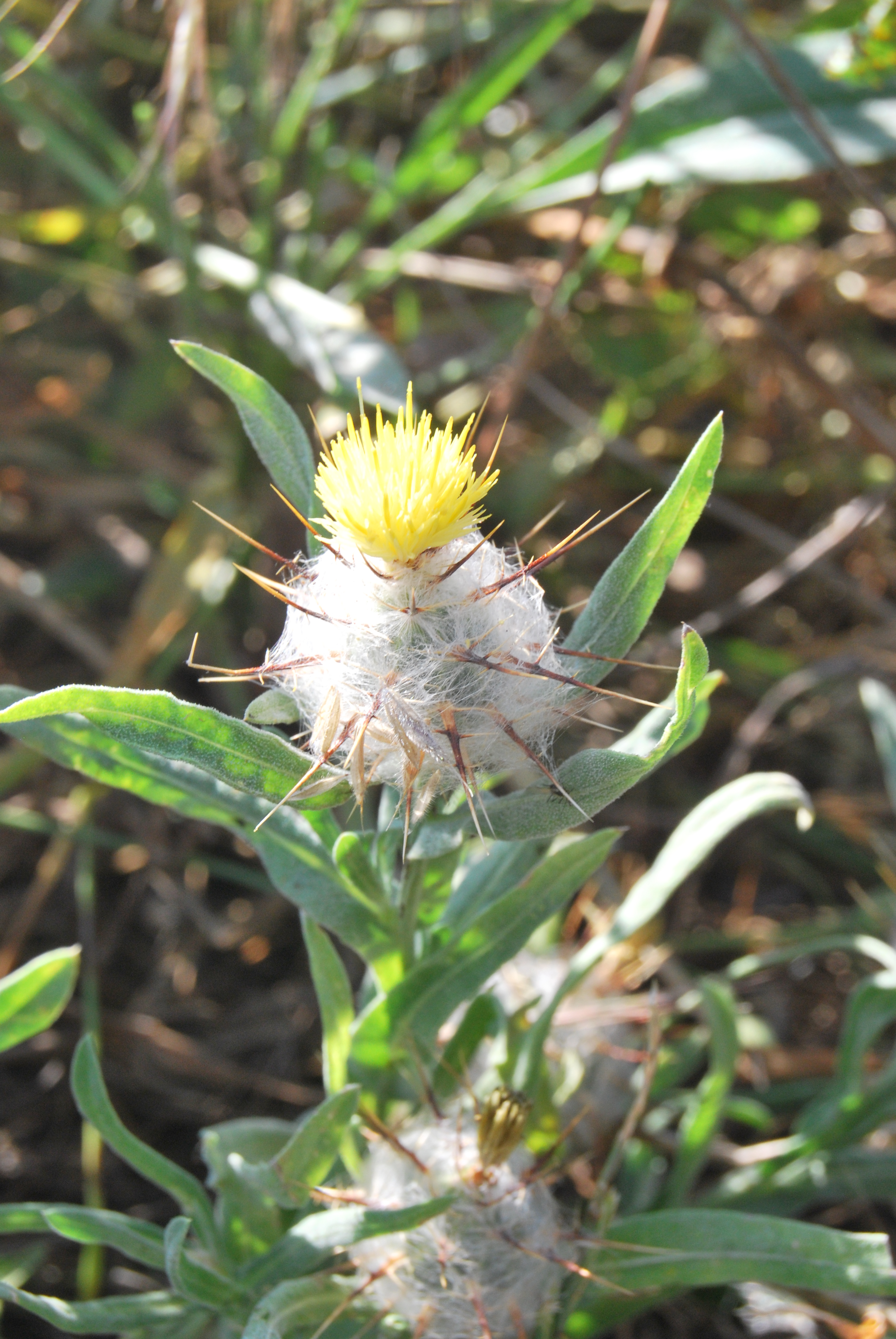 Centaurea eriophora, capítulo en flor